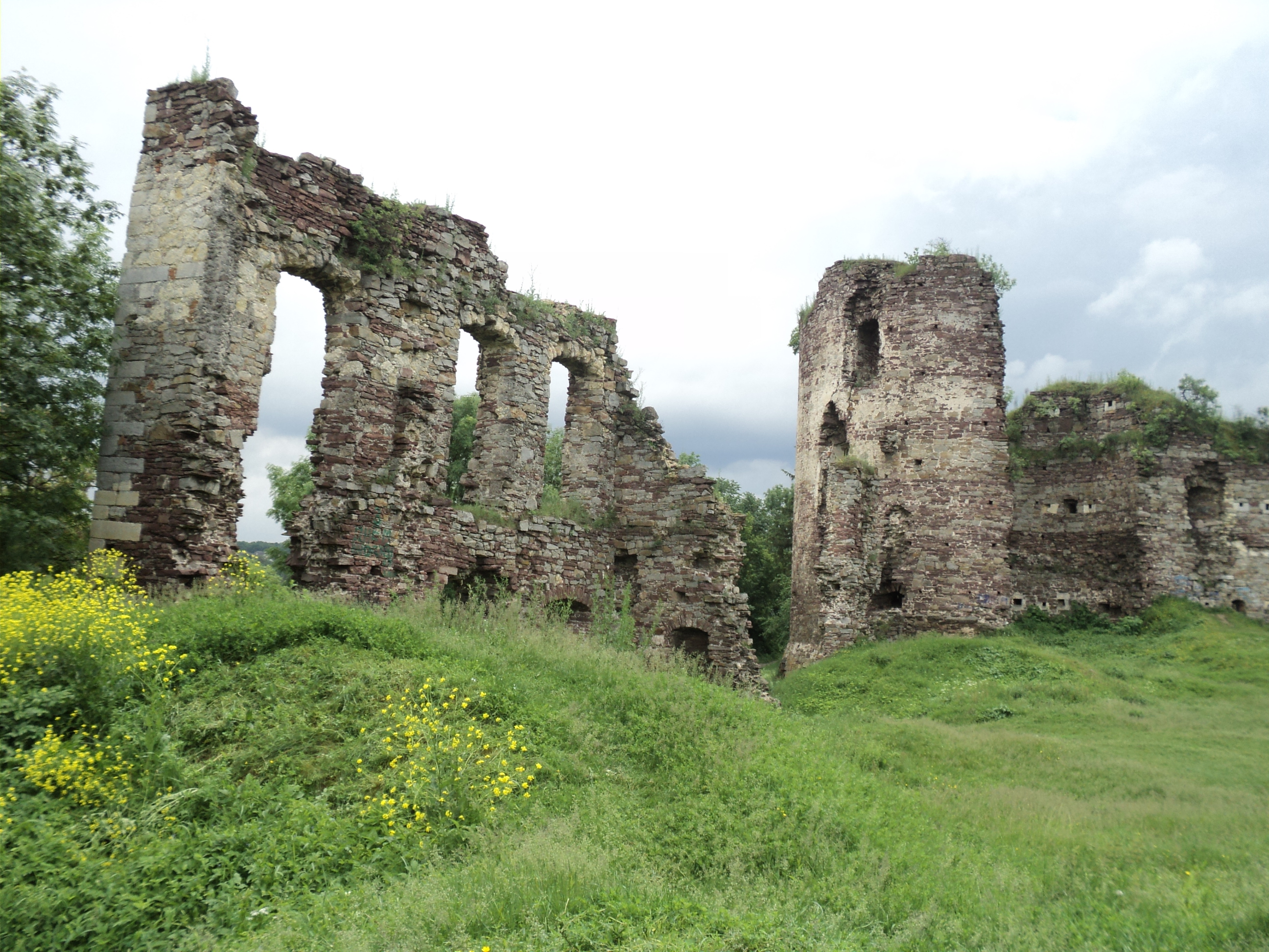 Замок (мур.), Бучач, вул. Замкова